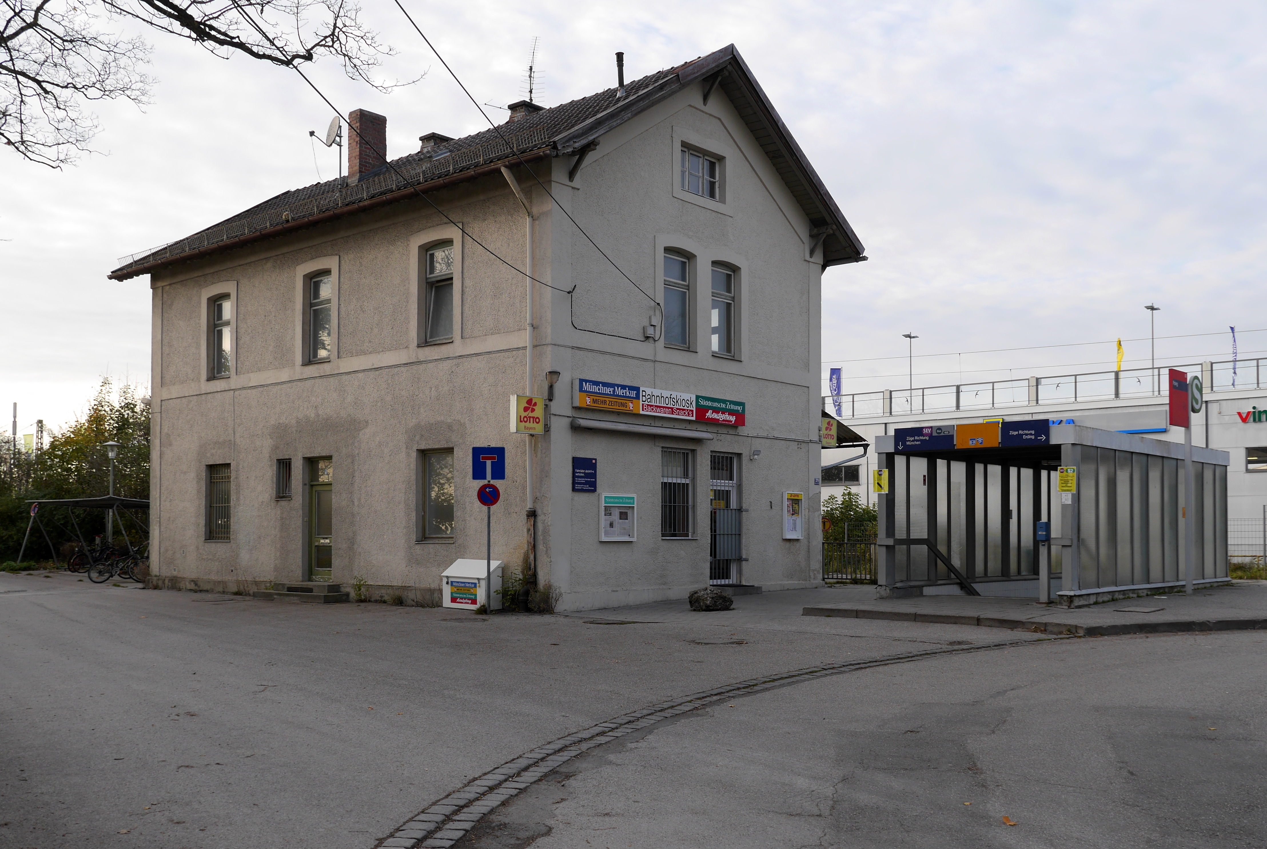 Empfangsgebäude des Bahnhofs Poing von der Straßenseite, rechts der Treppenabgang zur Bahnsteigunterführung, im Hintergrund das Einkaufszentrum CityCenter Poing.